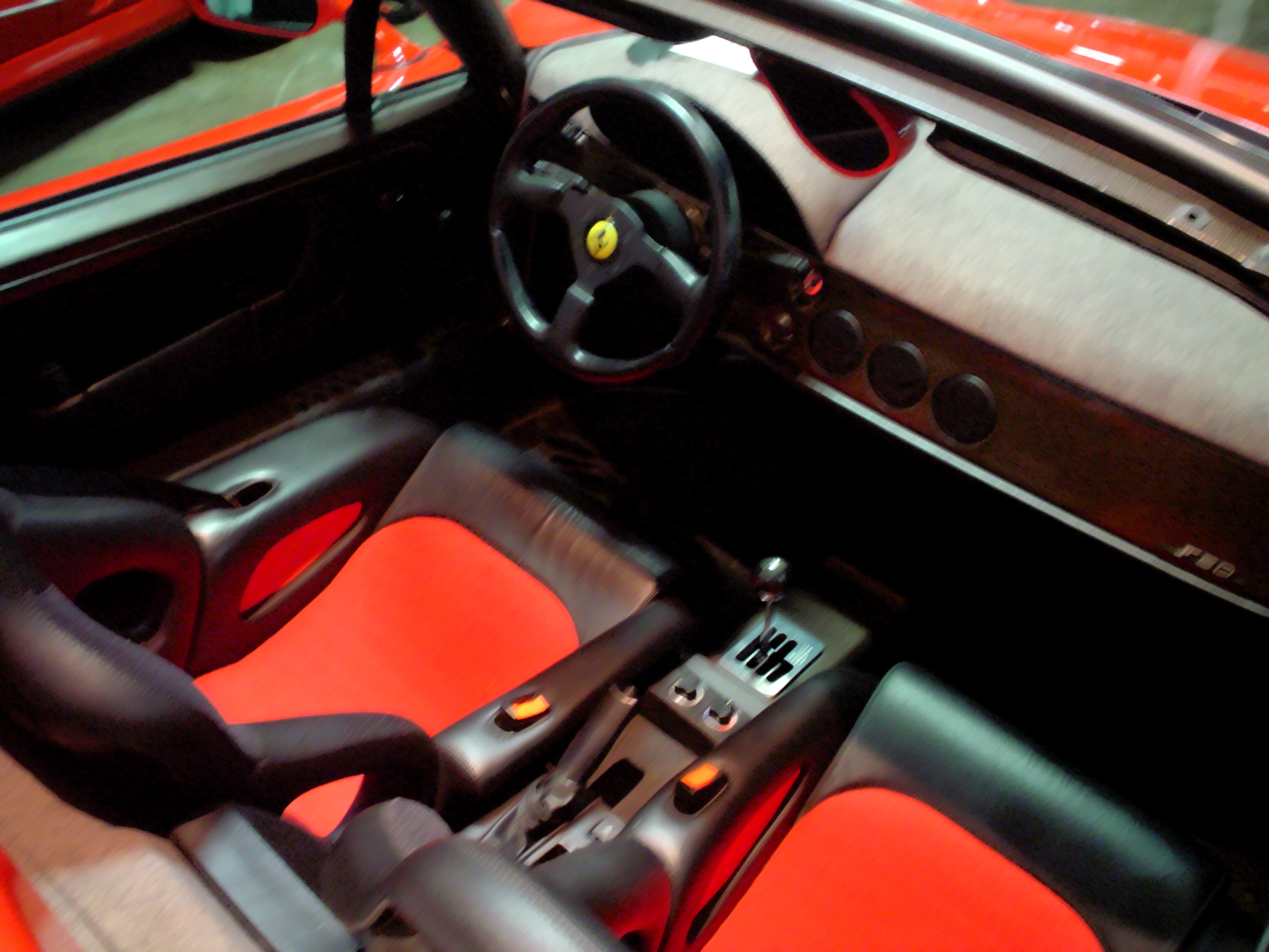 ferrari f50 interior